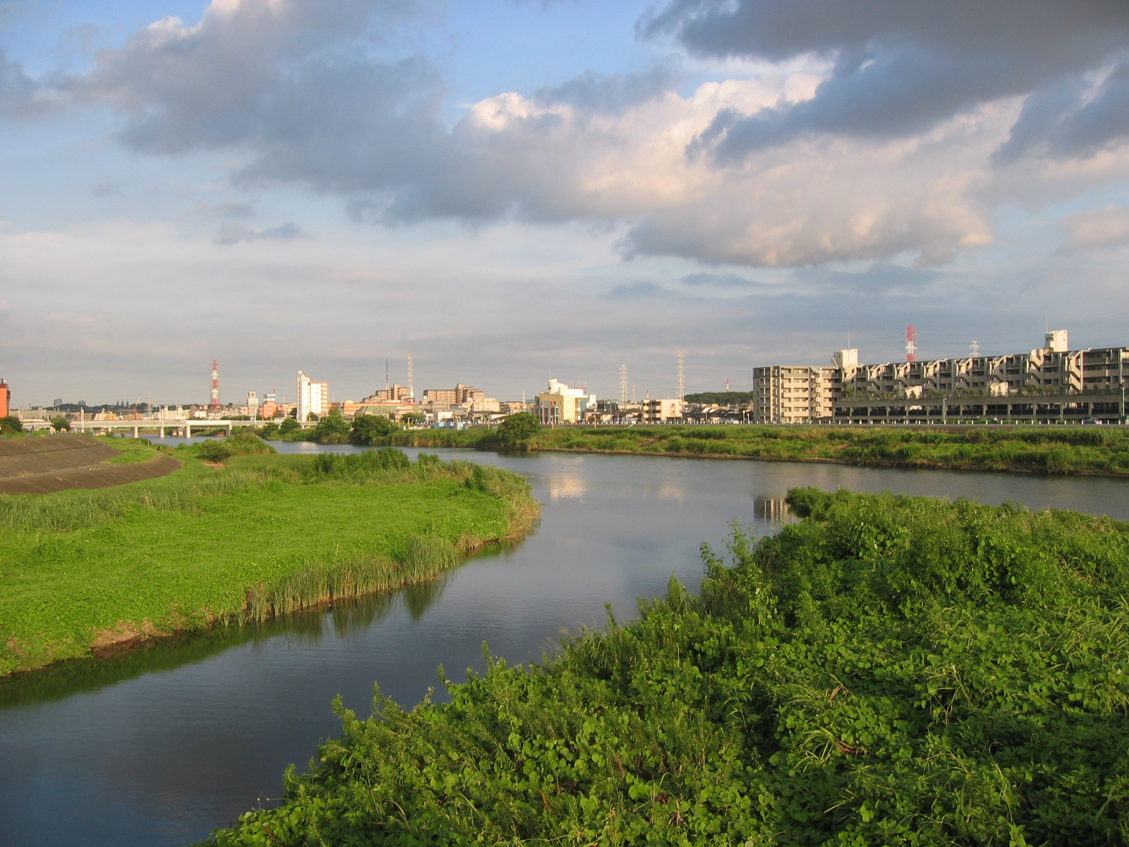 2006年8月21日、利用者自身の撮影。